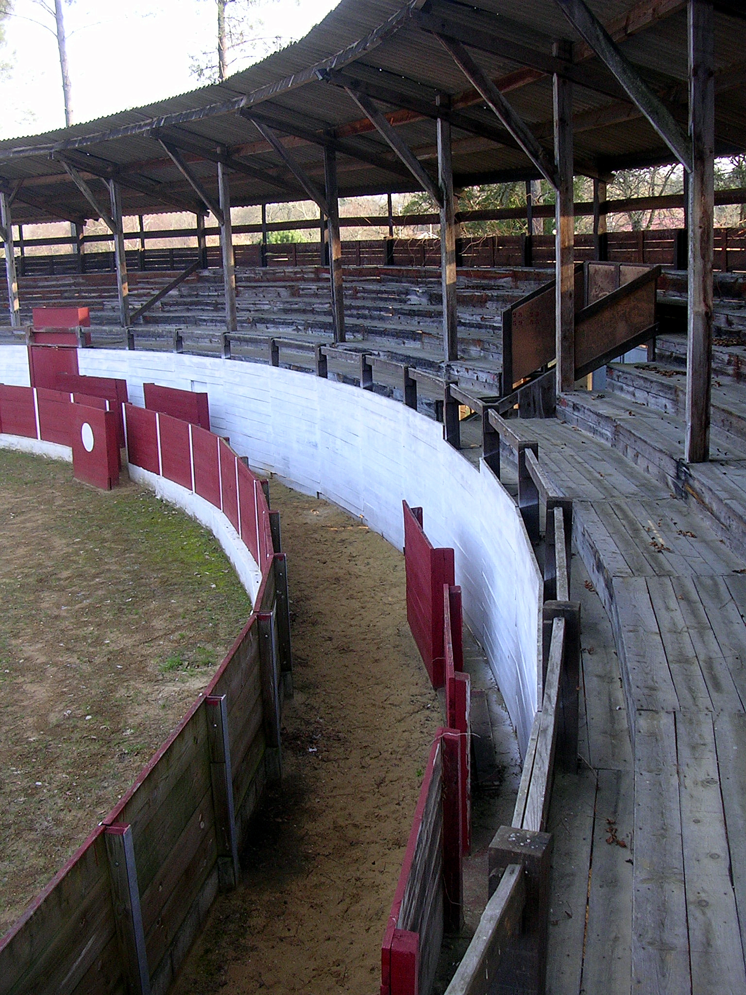 Arènes en bois de Brocas, dans le département français des Landes